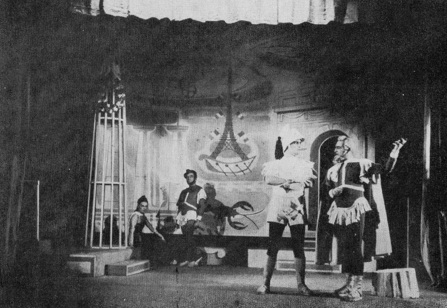 Pokaz Amfitriona 38 w Teatrze Domu Żołnierza w Łodzi - 1947.